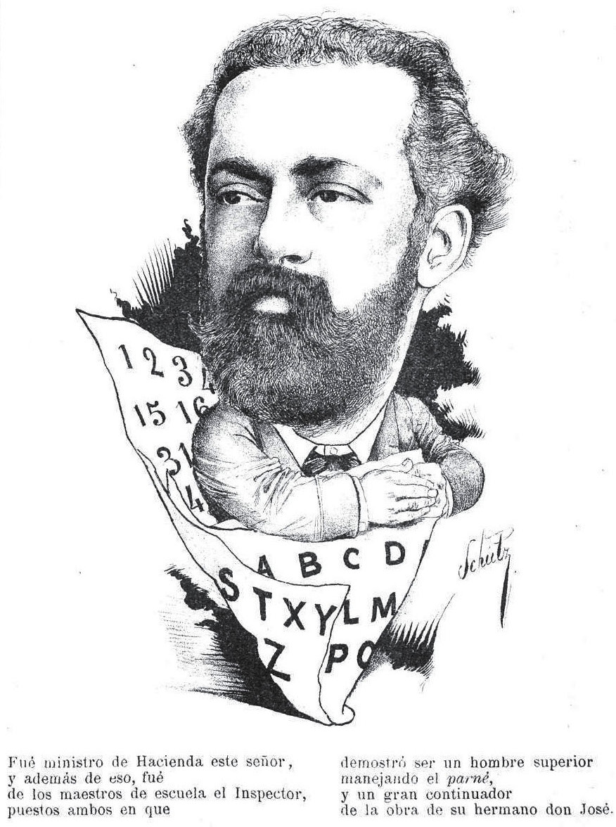 Jacobo A. Varela